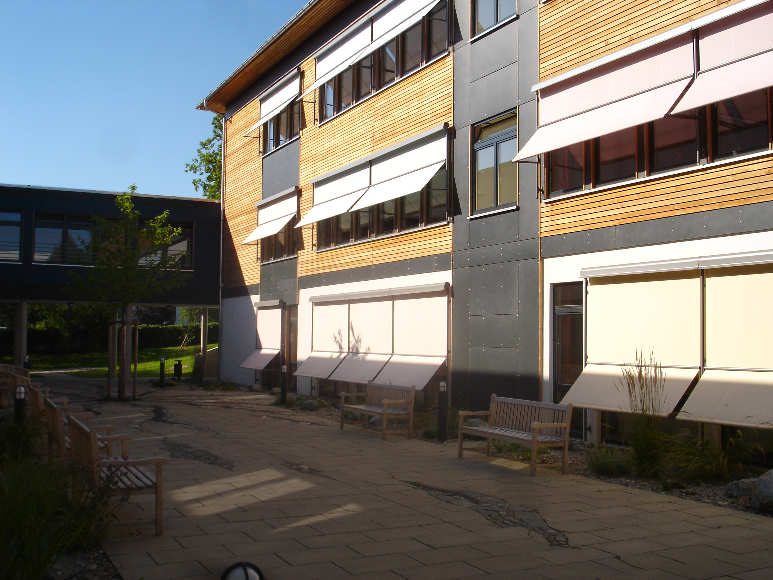 Übergang vom Hauptgebäude des Camerloher-Gymnasiums Freising zum Klassentrakt.